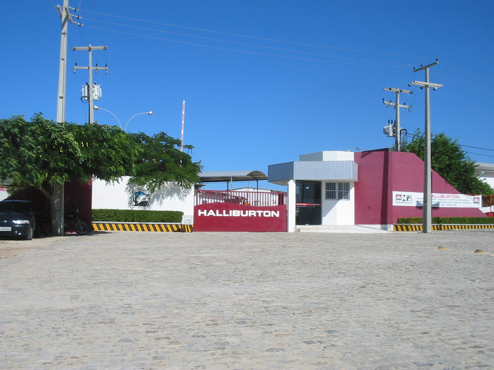 Mossoró (Rio Grande do Norte), Brasil. Sede da Halliburton. Halliburton headquarters. Mossoró (Rio Grande do Norte), Brazil.